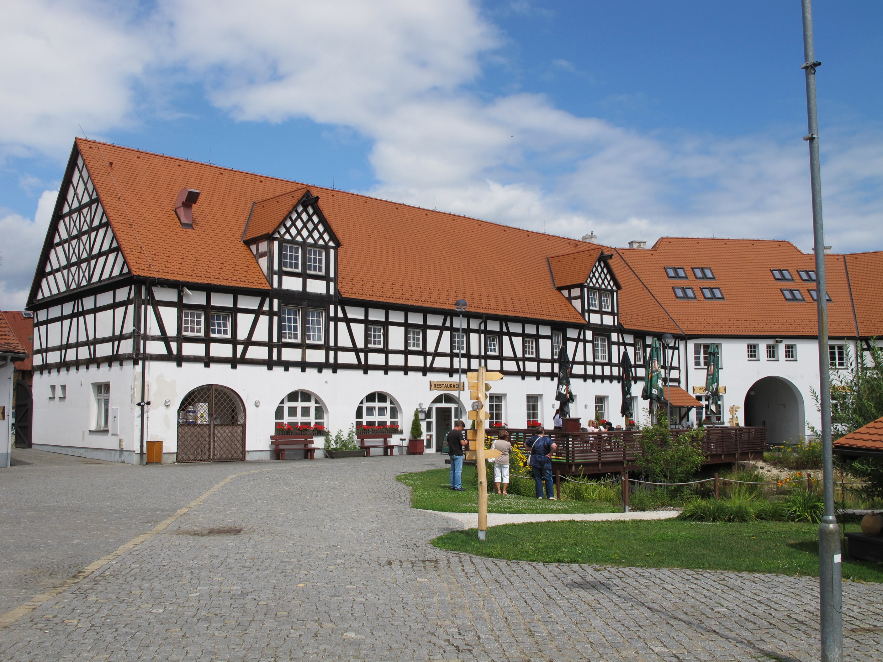 Statek Bernard